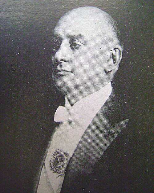 Foto oficial del presidente Alvear en el año 1922.